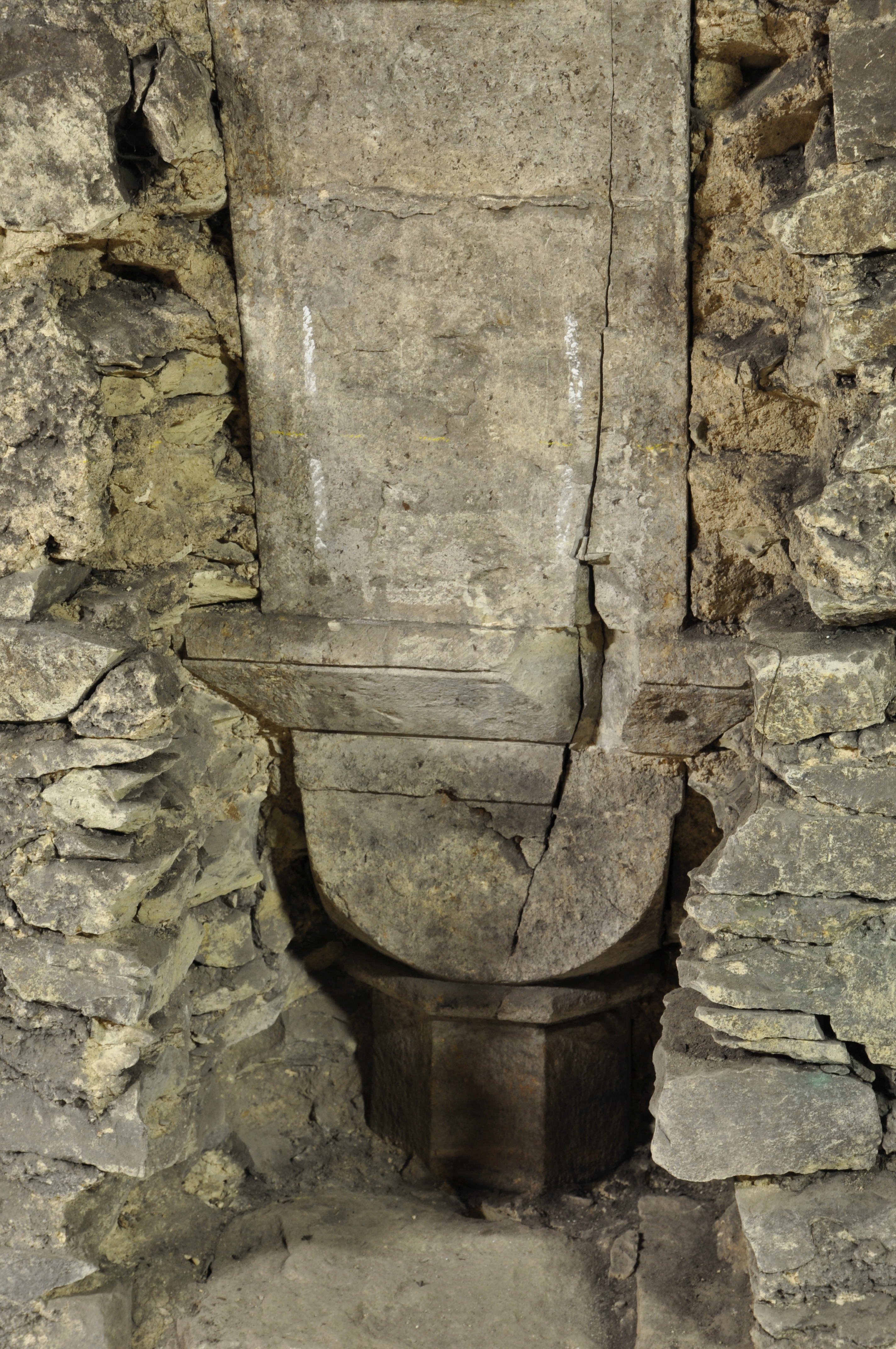 Detail hlavice románského sloupku paláce bývalého hradu v Roudnici nad Labem